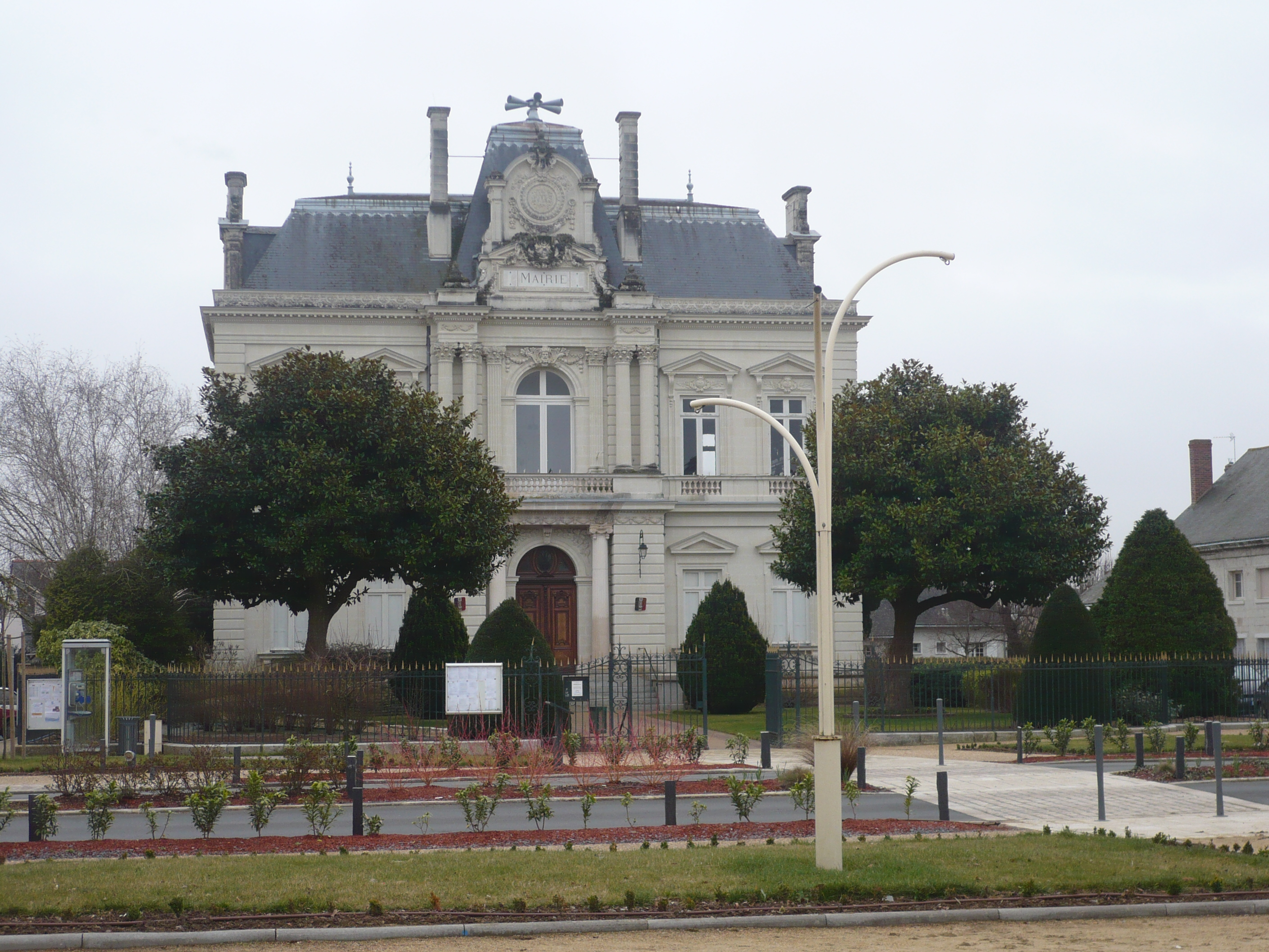 photo de la mairie de la Ménitré, prise depuis la place.